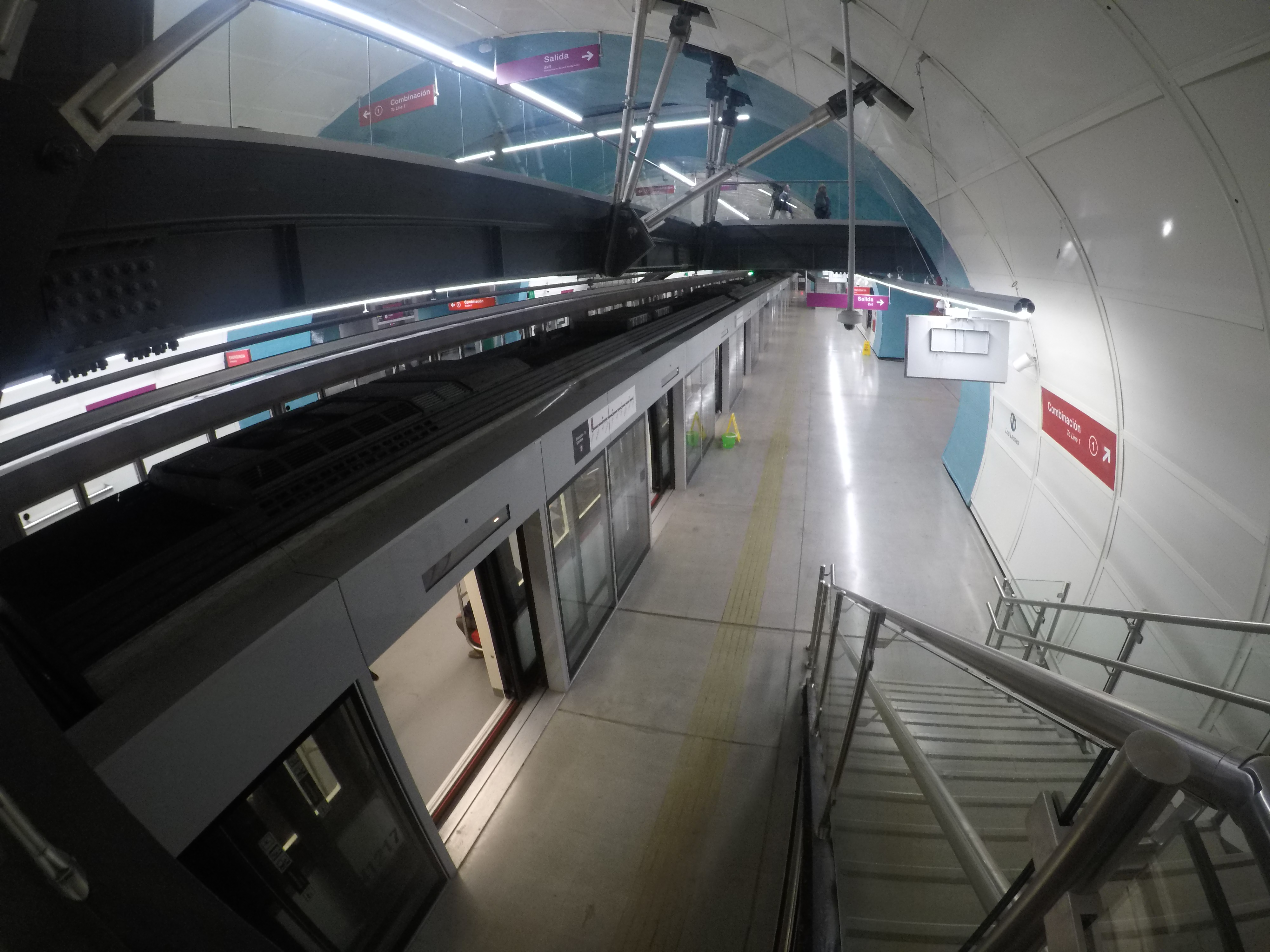 Estación de la Línea 6 del Metro de Santiago.